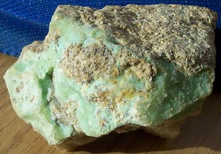 chryzopraz, pochodzenie Polska, autor zdjęcia Sebastian Socha 11.10. 2006 r.